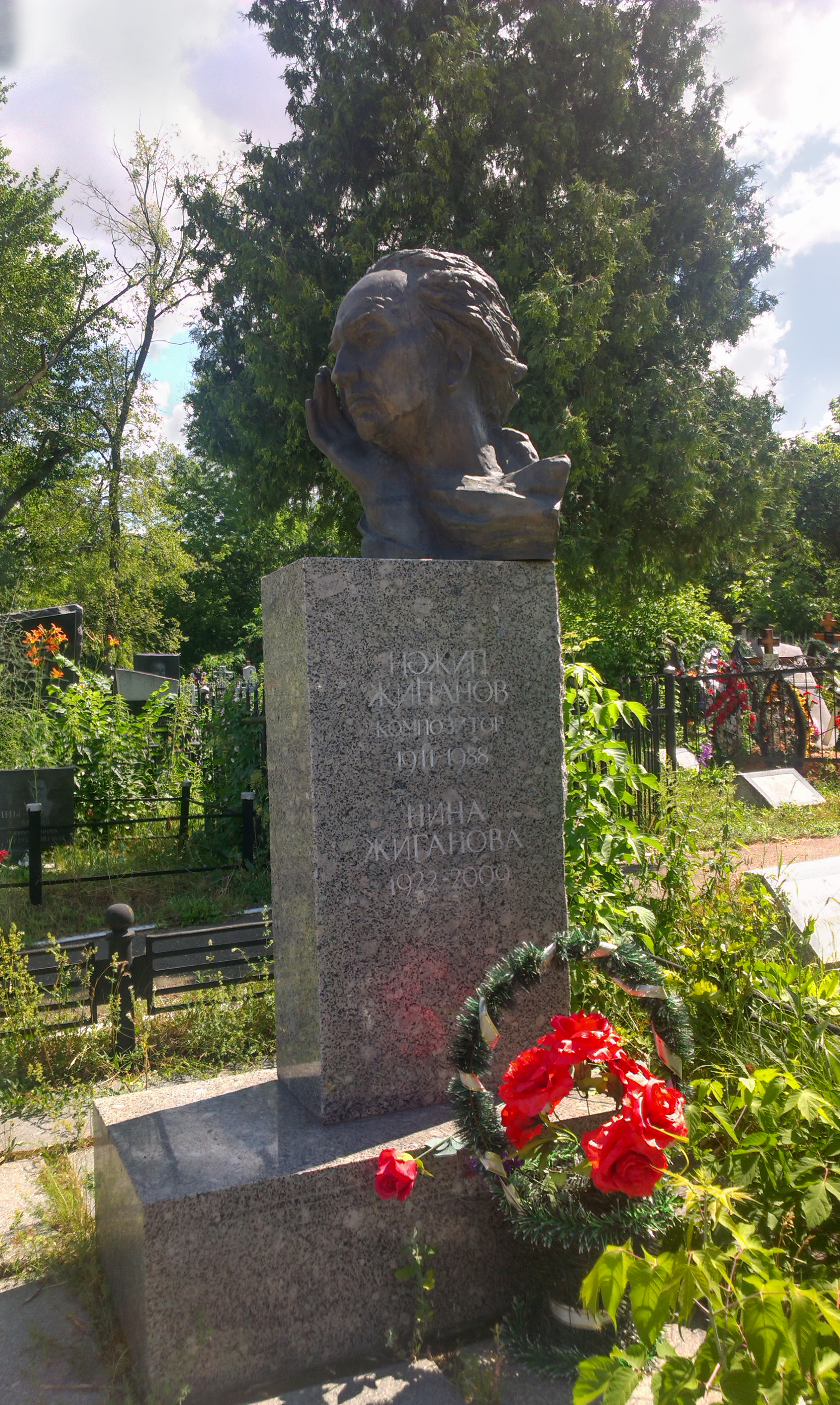 Арское кладбище